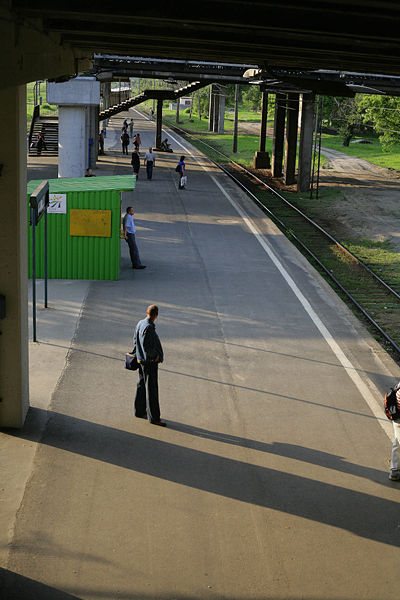 Peron stacji Warszawa Toruńska